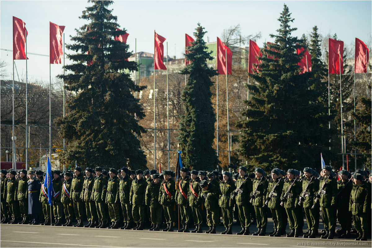 Парадный строй. Парад Памяти, Самара, 2013